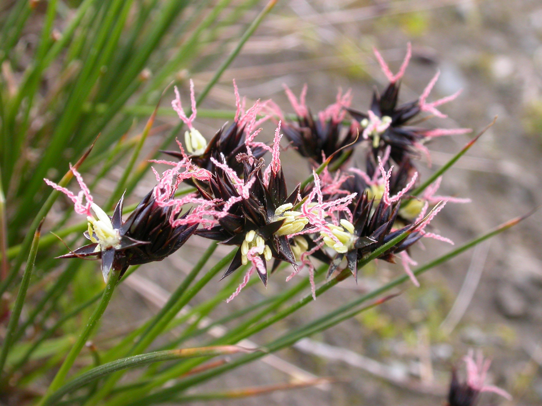 Juncus jacquinii Zermatt, Riffelberg (Kanton Wallis, Switzerland), 2500 m Author: Barbara Studer – own photograph Date: 2.08.06